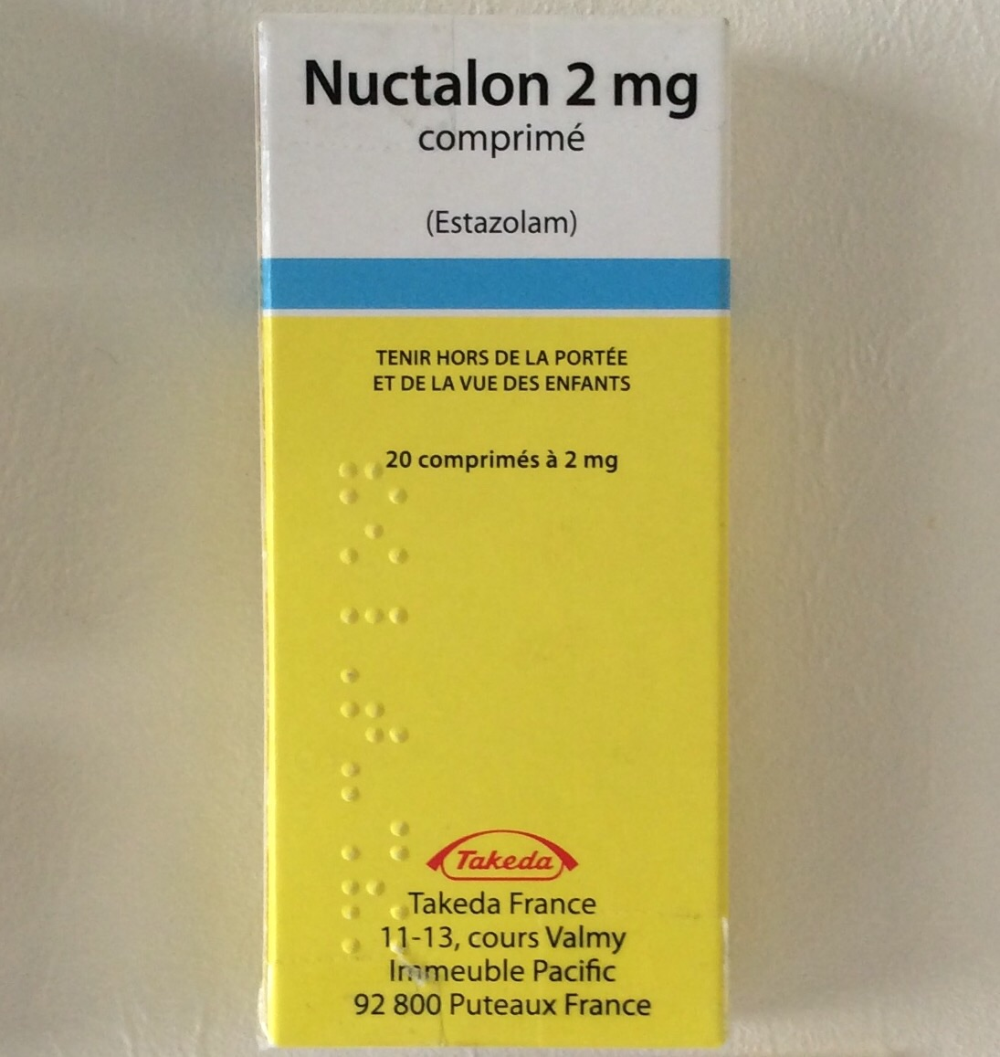 Boite de nuctalon 2 mg (estazolam)